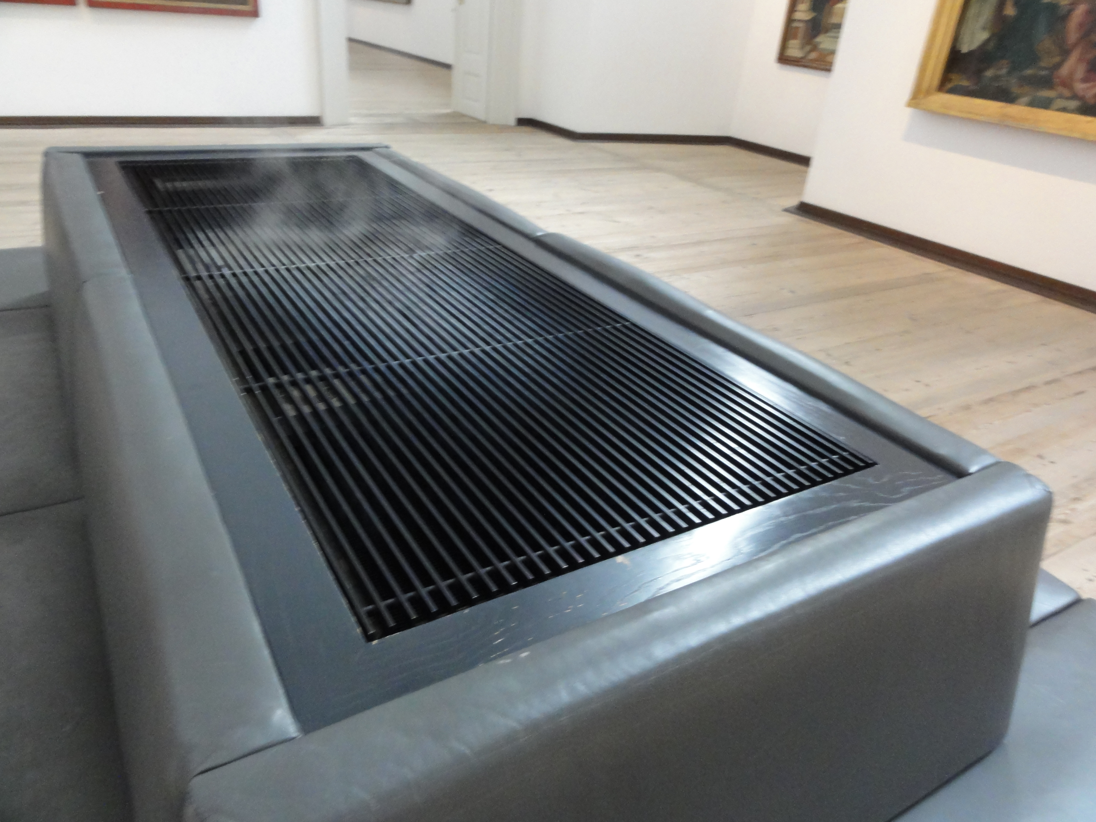 Augsburg, Schaezlerpalais (Staatsgalerie Altdeutsche Meister) Humidifier